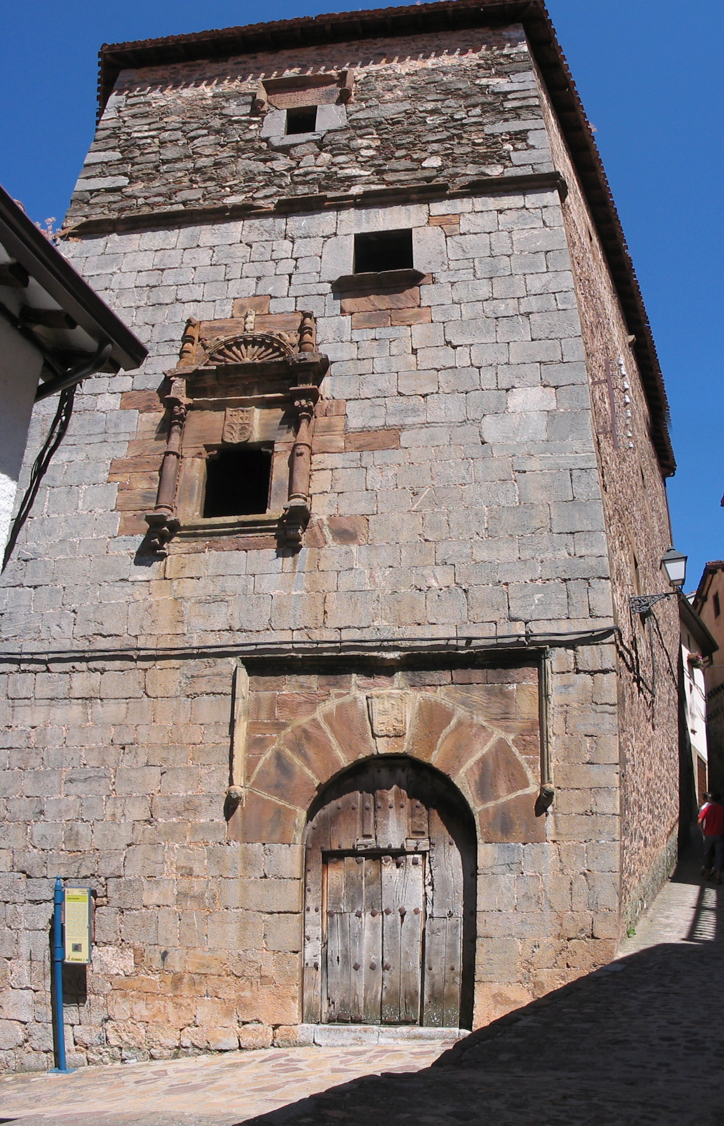 Ortigosa de Cameros (La Rioja, España). Casa Grande (ca. 1530)